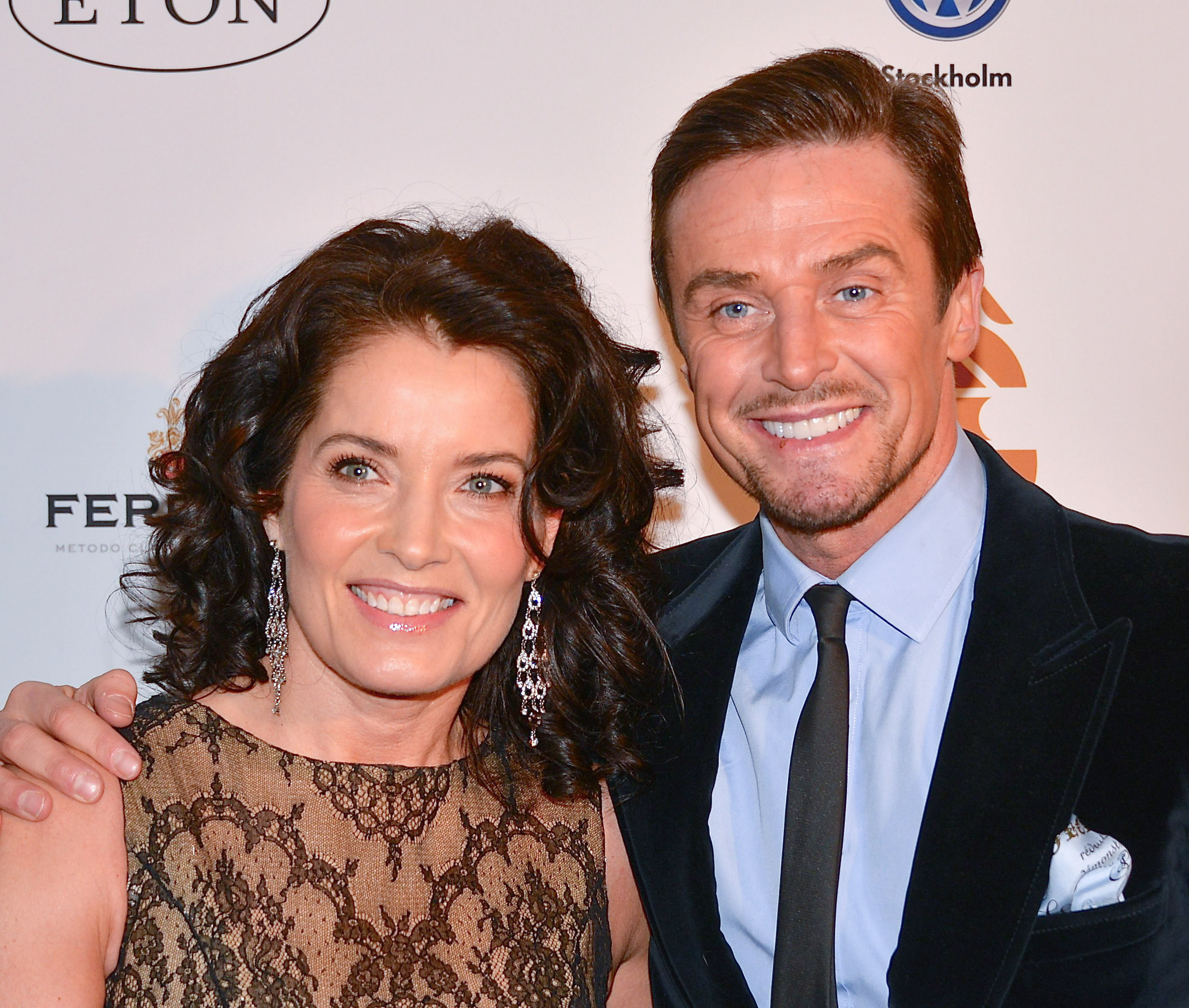 Agneta Sjödin & Johan Pråmell på Guldbaggegalan den 21 januari 2013.